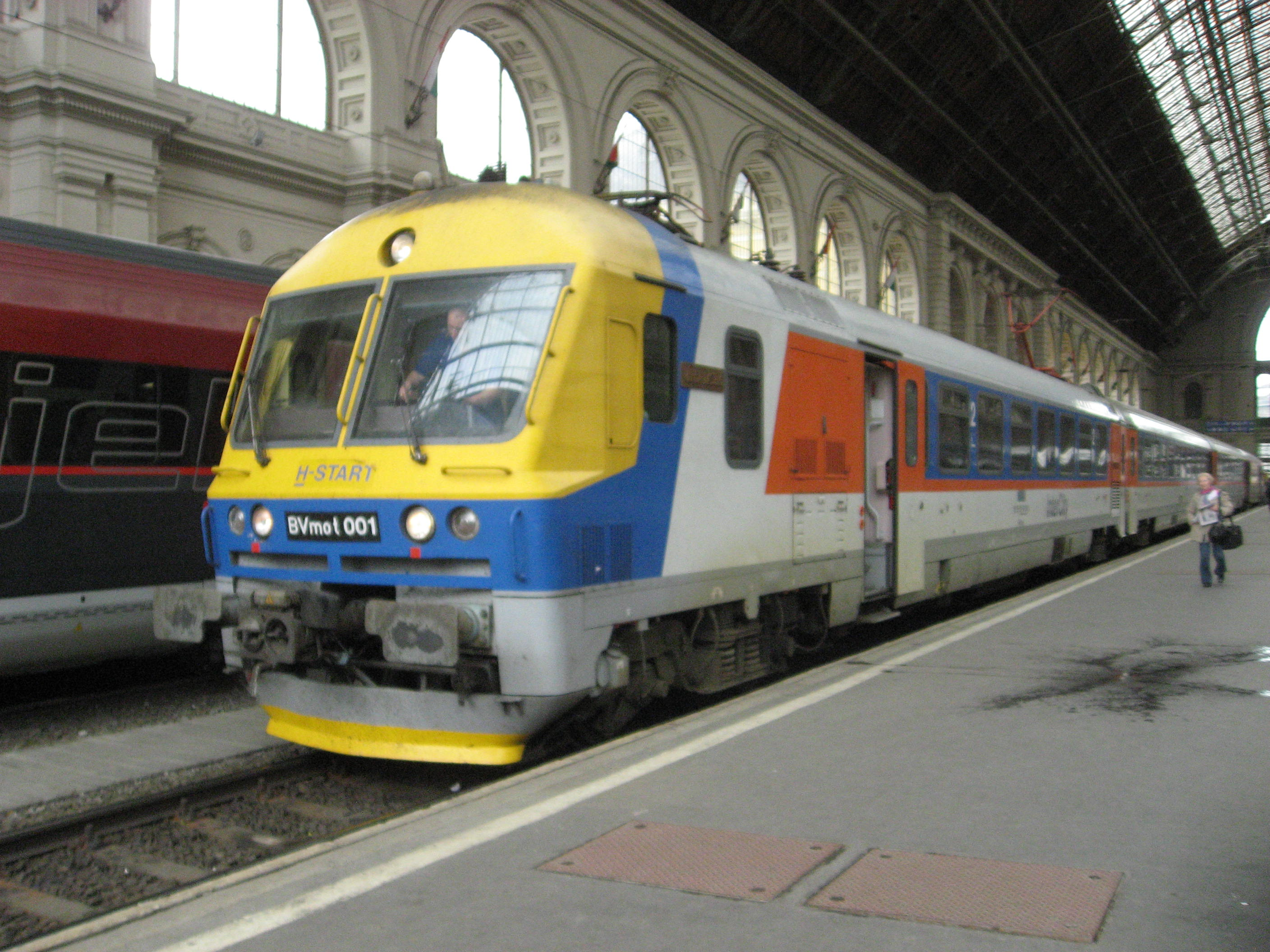 A BVmot 001 pályaszámú szerelvény Budapest-Keleti pályaudvaron